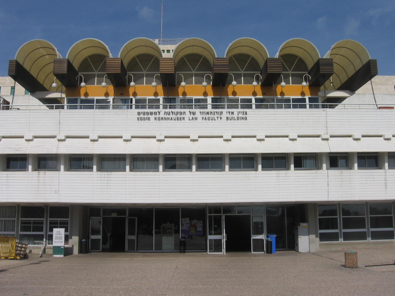 מבנה הפקולטה למשפטים באוניברסיטת חיפה